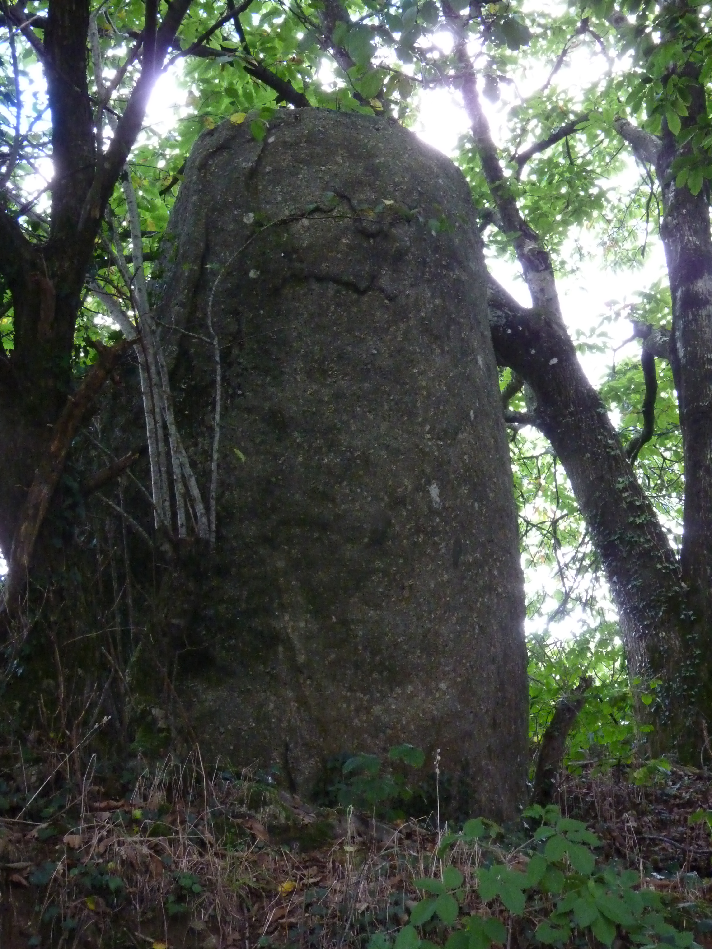 Menhir de taille moyenne en bordure du chemin menant à Bodquelen.